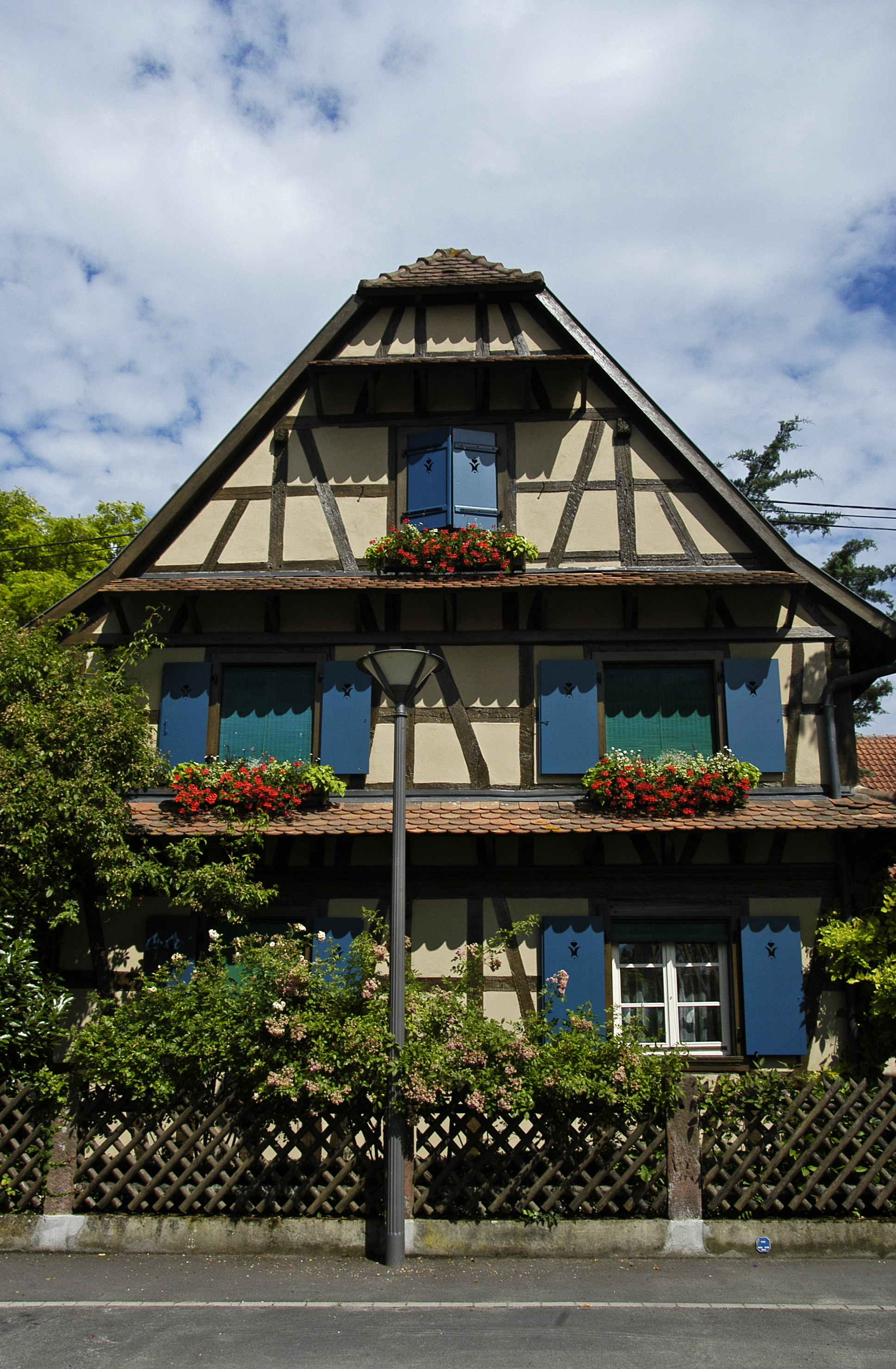 Colombages et géraniums aux fenêtres